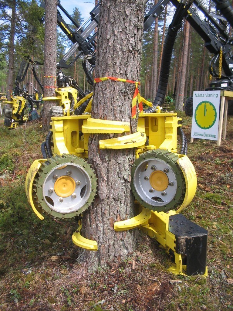 Harvesterkopf Vorderseite, Vorführung auf der Elmia Wood 2005